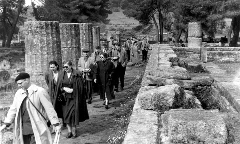 Pierre Gilbert guide un voyage